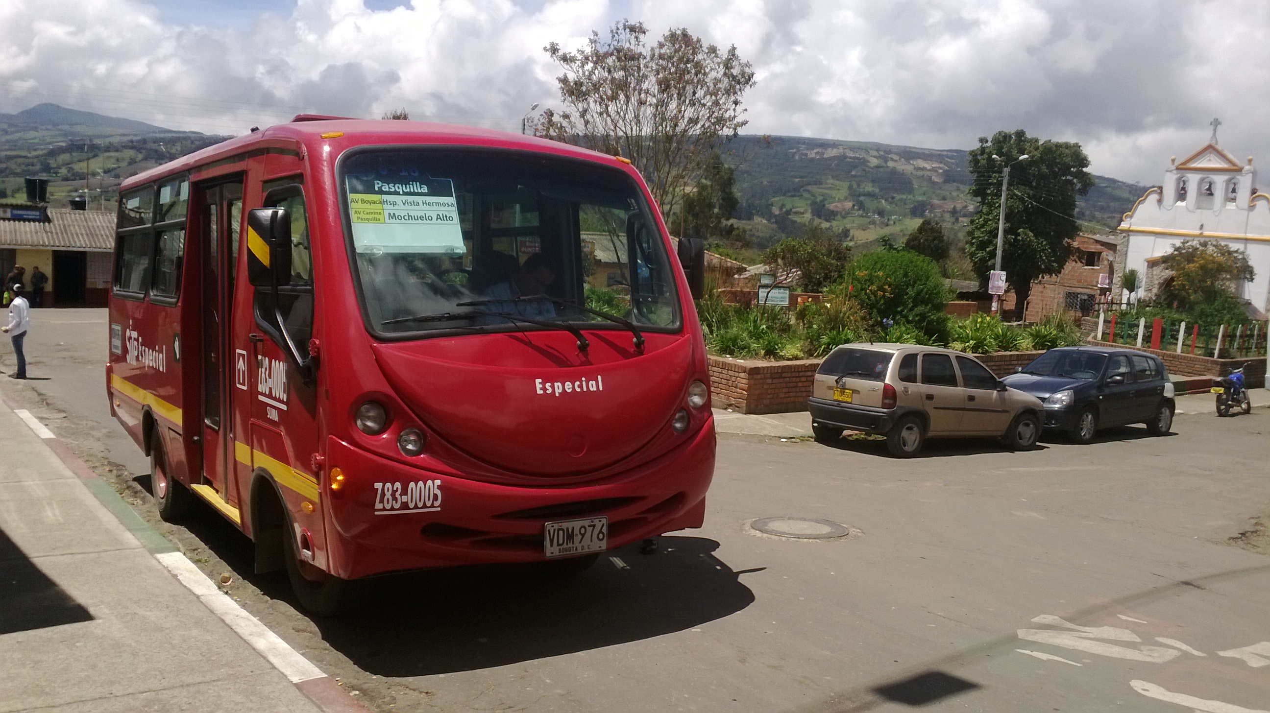 Bus especial del SITP operando la ruta 6-18 en la vereda Pasquilla de la localidad de Ciudad Bolívar en Bogotá D.C., Colombia.